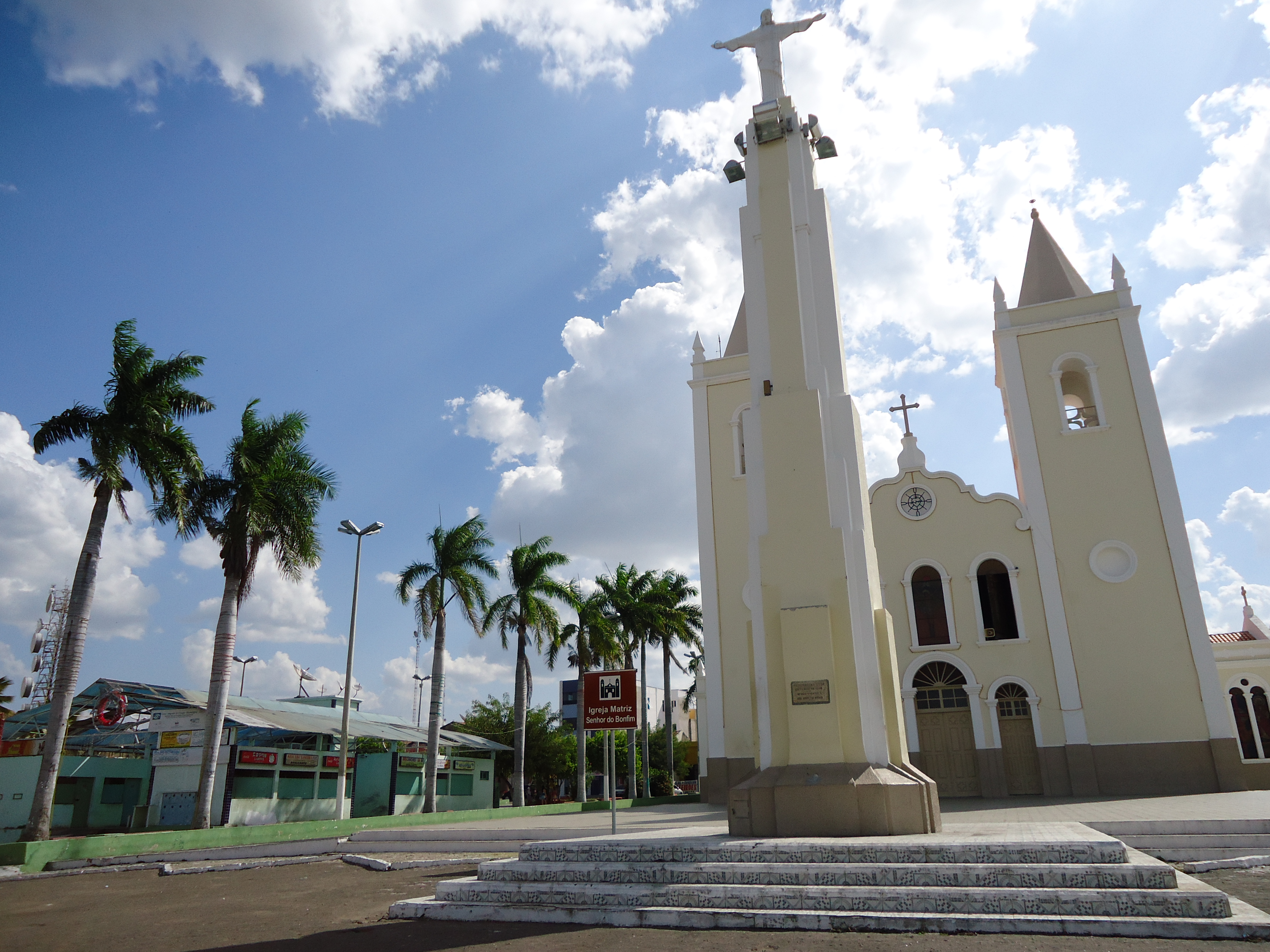 Igreja Matriz de Crateús